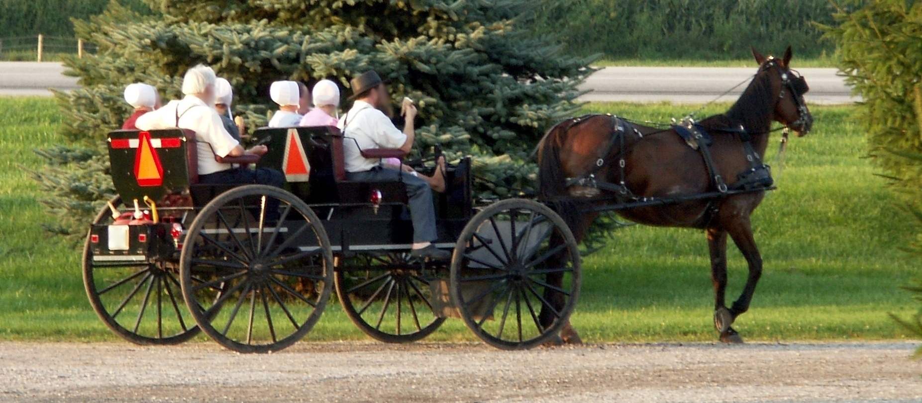 Amish